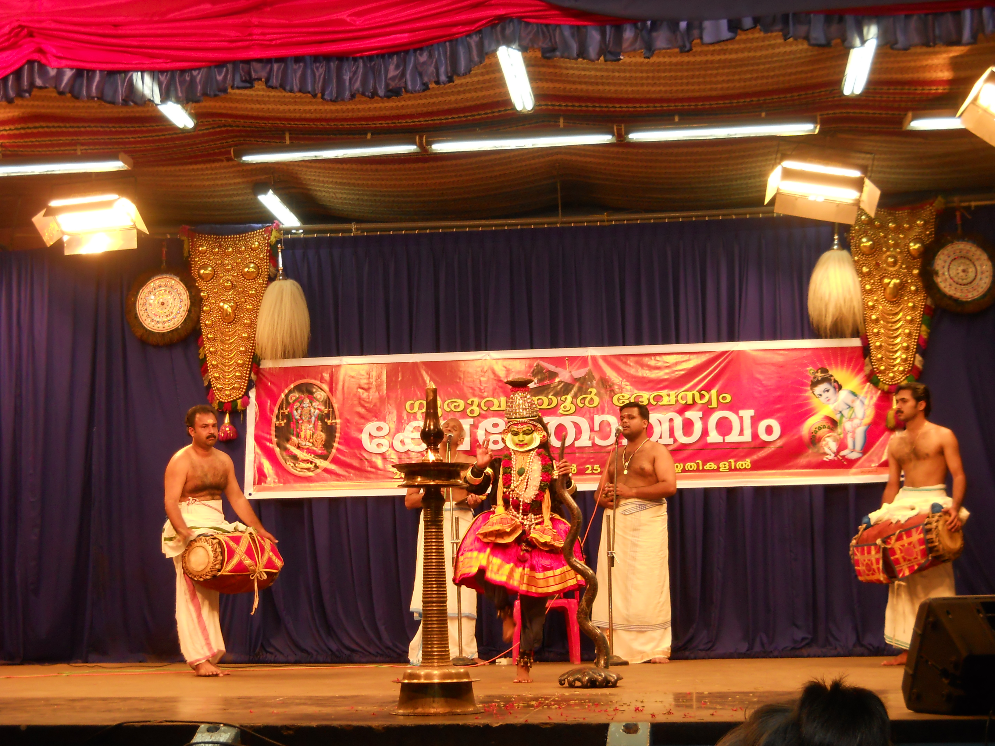 കൃഷ്ണനാട്ടം, ഗുരുവായൂര്‍